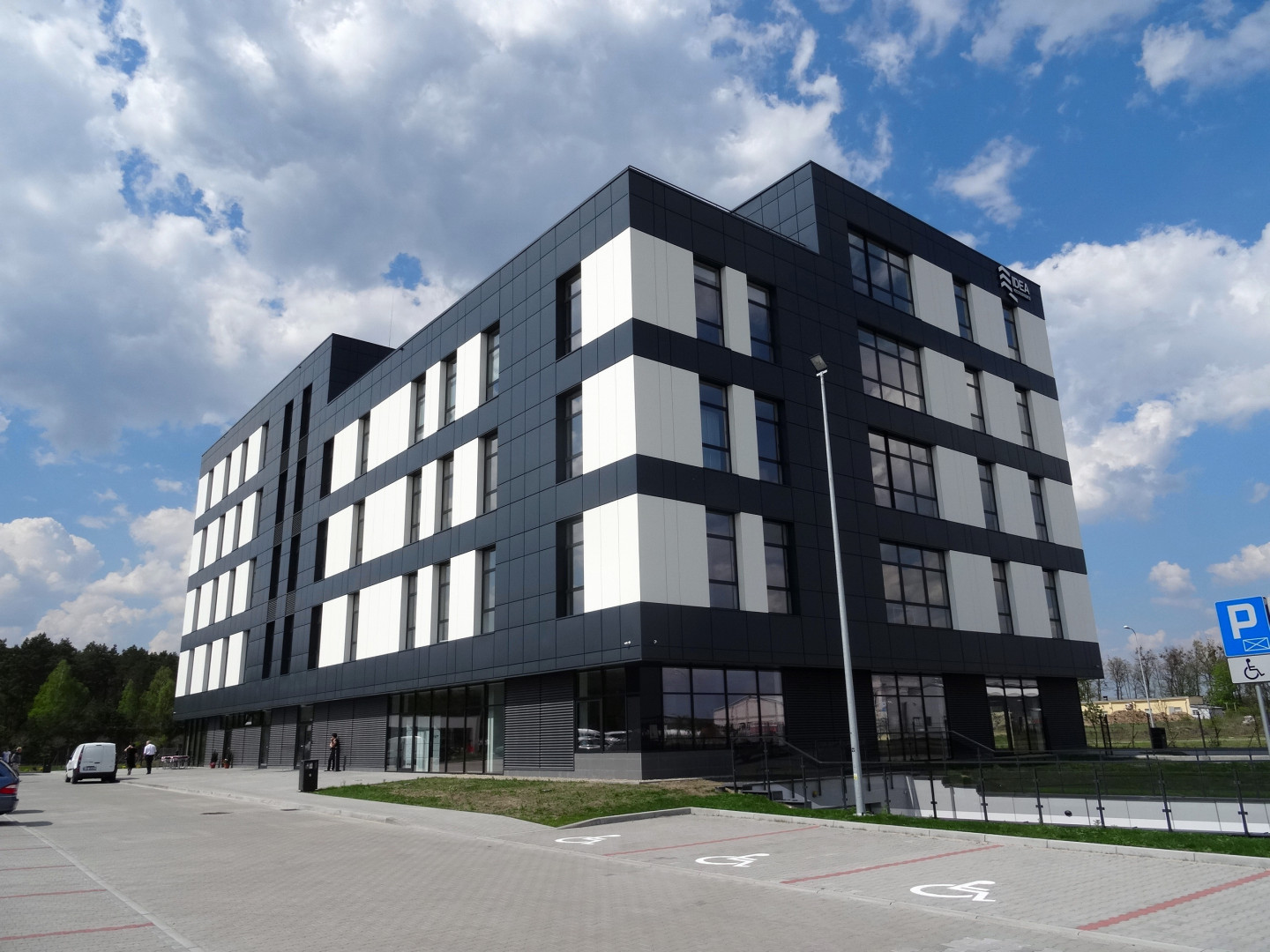 Idea Przestrzeń Biznesu - biurowiec w Bydgoszczy na terenie Bydgoskiego Parku Przemysłowo-Technologicznego